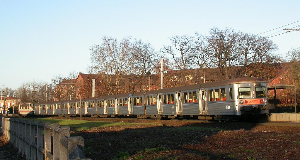 Ancienne navette ferroviaire de Aulnay-sous-bois à Bondy jusqu'en décembre 2003